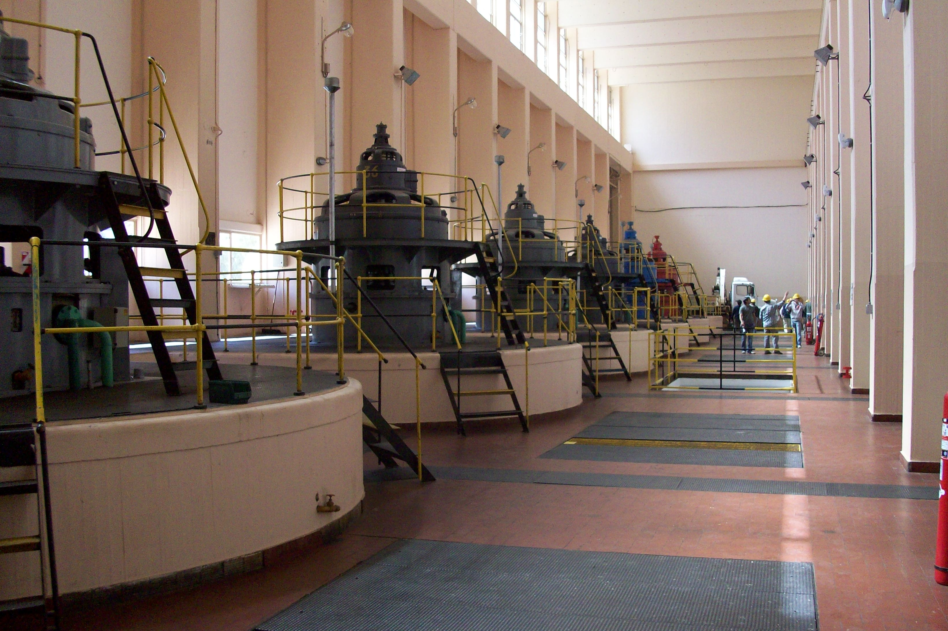 Sala de turbinas en central hidroeléctrica Los Nihuiles